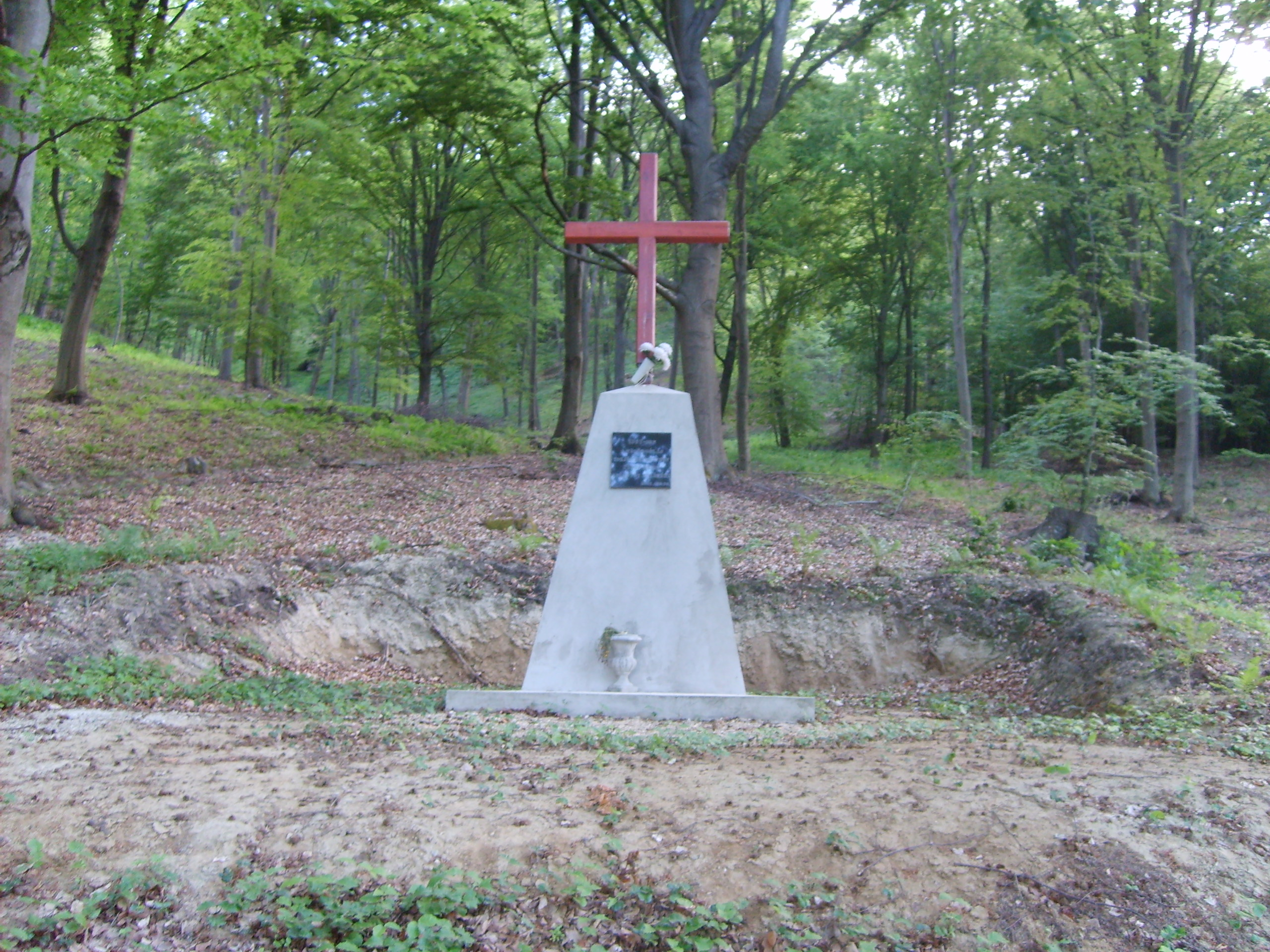 A hangonyi Pálos rendi kolostor helyén álló emlékmű